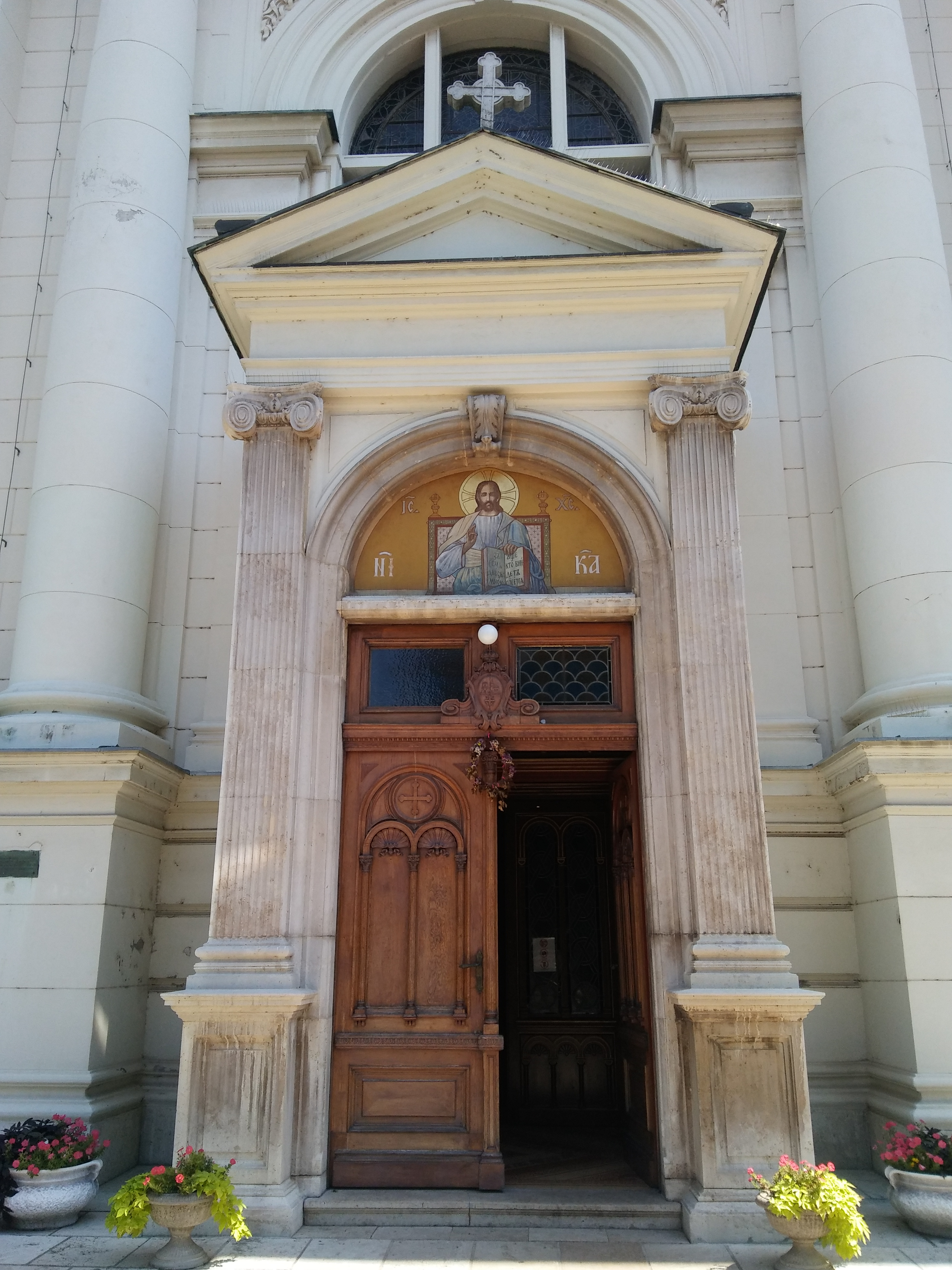 Српски (ћирилица): Саборна црква у Сремским Карловцима је главни и највећи православни храм у Сремским Карловцима, смештен уз некадашње седиште Српске патријаршије, стари Патријаршијски двор, данас владичански двор Сремске епархије Српске православне цркве. Саборна црква у Сремским Карловцима је средишња црква епархије.